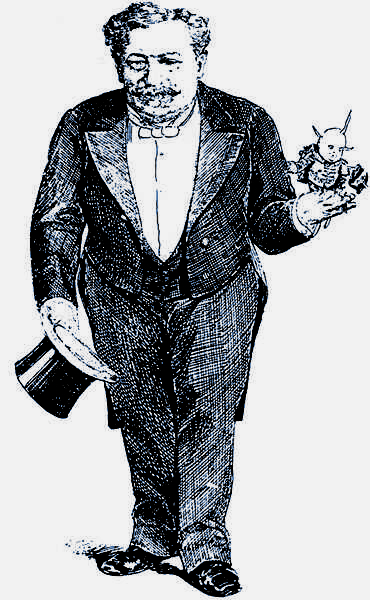 Ágai Adolf Borsszem Jankó élclap figurájával - karikatúra "1867-nek őszén, midőn az addig Deák-párti »Bolond Miska«, szint változtatva, átcsapott az ellenzéki táborba: a parlamenti többségnek egyes tagjai szükségesnek vallották, hogy már most Deák-párti élczlap is legyen, amely a balpártinak vagdalkozásait a többség ellen fölfogja s vissza is vágjon.” (Ágai Adolf)